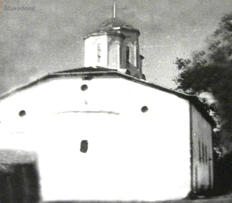 црква СВ.Архангел Виница